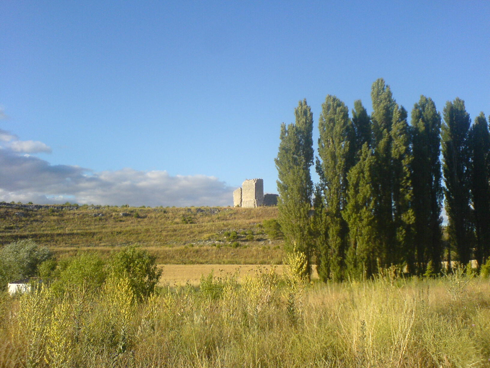 Torreón de Minguela desde sus alrededores